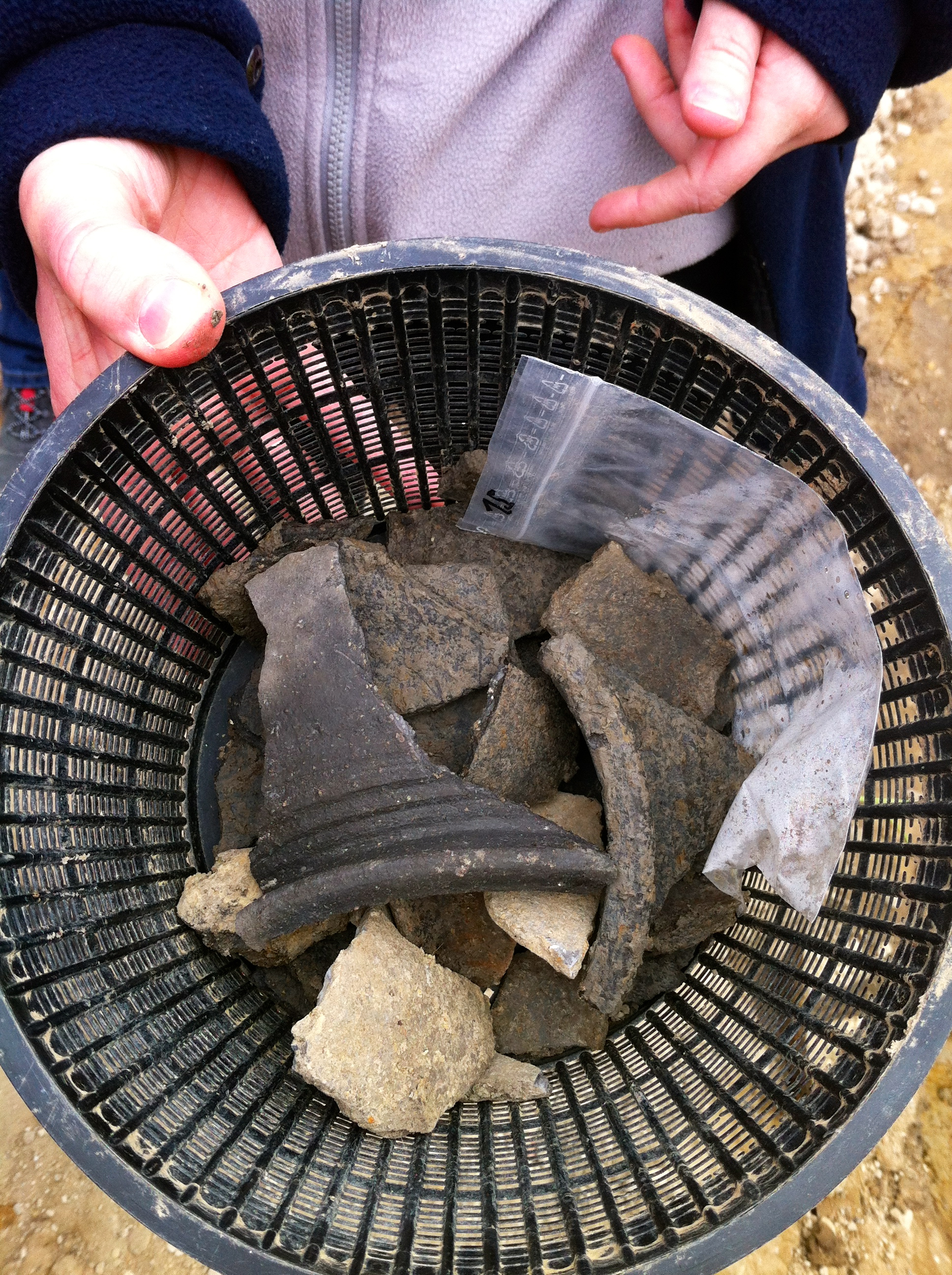 Ausgrabung Wennigsen Kita Vogelnest Fund Nr. 13, Bild 1. Tonscherben. 9 bis 10 Jhd.